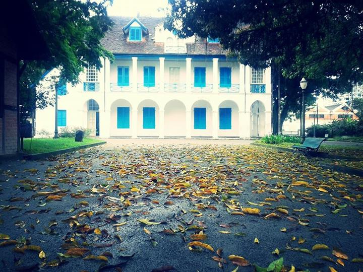 Museu Nacional de Imigração e Colonização - fundos da casa.